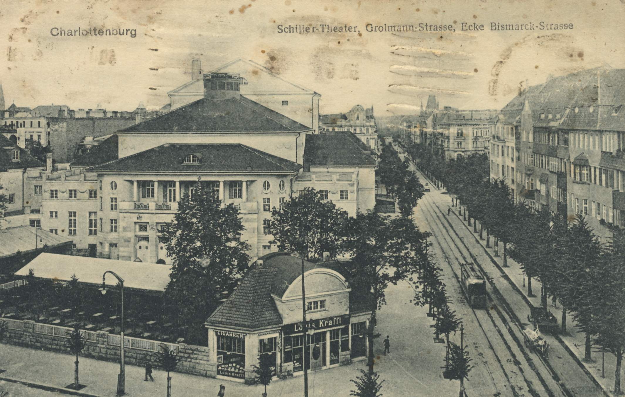 Schillertheater an der Ecke Bismarckstraße / Grolmannstraße. Dieser Abschnitt der Grolmannstraße wurde am 1. Juli 1967 in Am Schillertheater umbenannt.